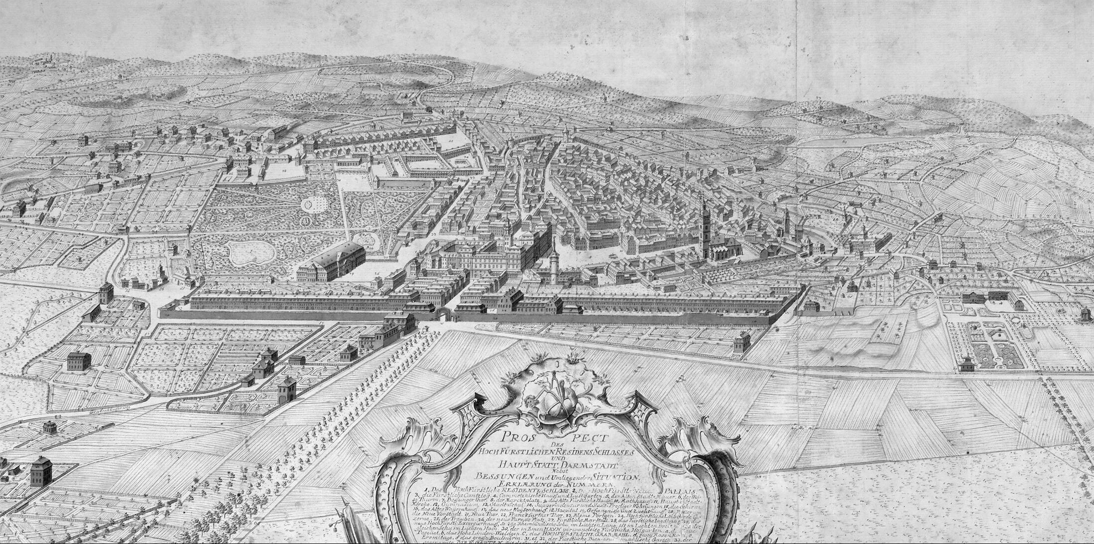 Prospect des Hochfürstlichen Residezsschlosses und Hauptstadt Darmstadt, aufgenommen und gezeichnet von J. Jacob Hill, Fürstl. Ingenieur Lieutenant, 1776